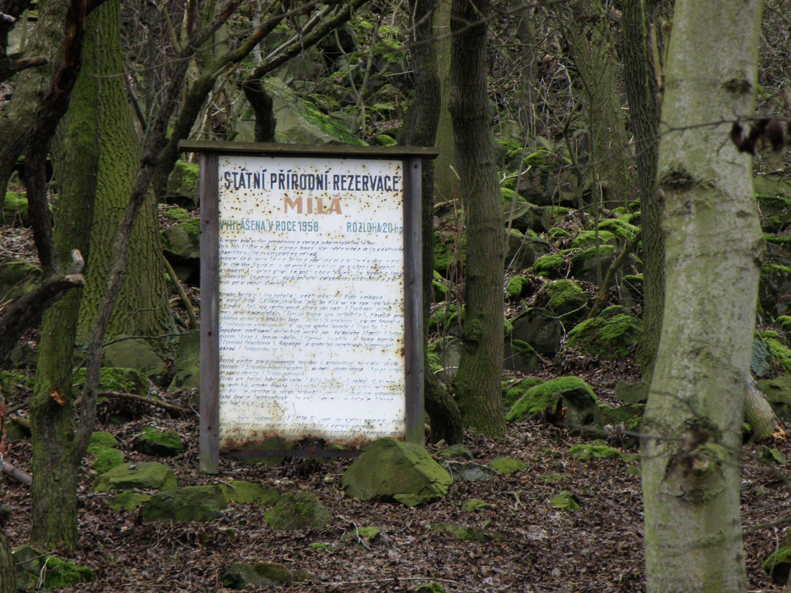 vrch Milá, obec Milá, okres Most